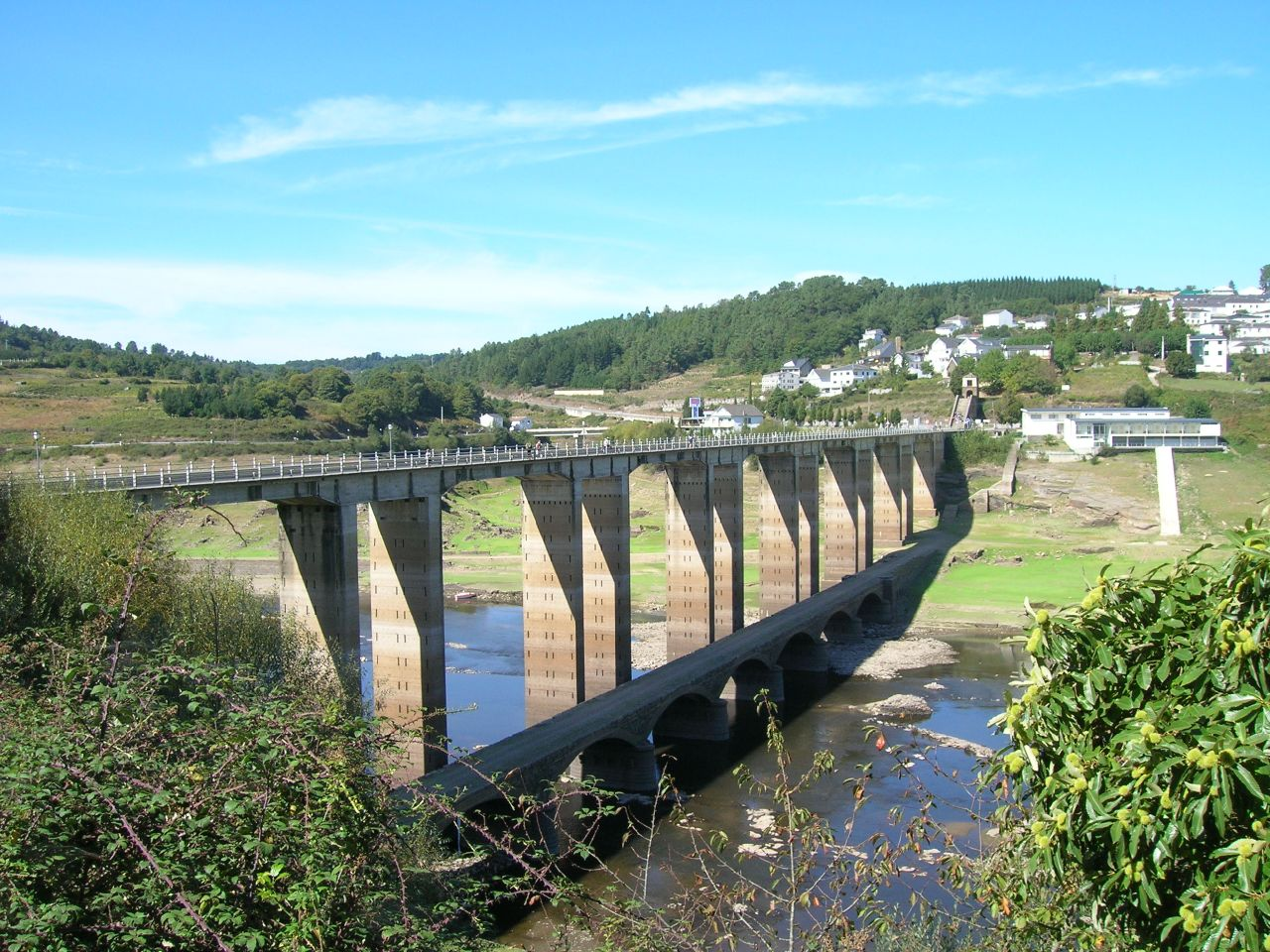 Most přes řeku Miño ve městě Portomarín, Galicie, Španělsko